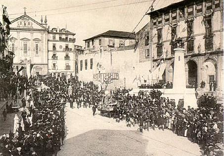 Ano de 1894. O cortejo e o carro alegórico dirigem-se para a Praça do Infante. Do lado direito pode-se ver o antigo Convento de São Bento de Avé Maria que seria destruído um ano depois em 1895 para dar lugar à estação de S. Bento.